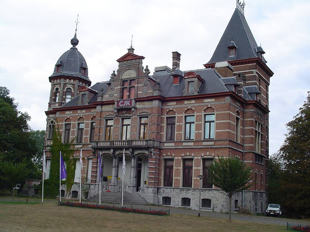 Het kasteel Claeys Bouüaert in vooraanzicht. Kasteel Claeys Bouüaert.